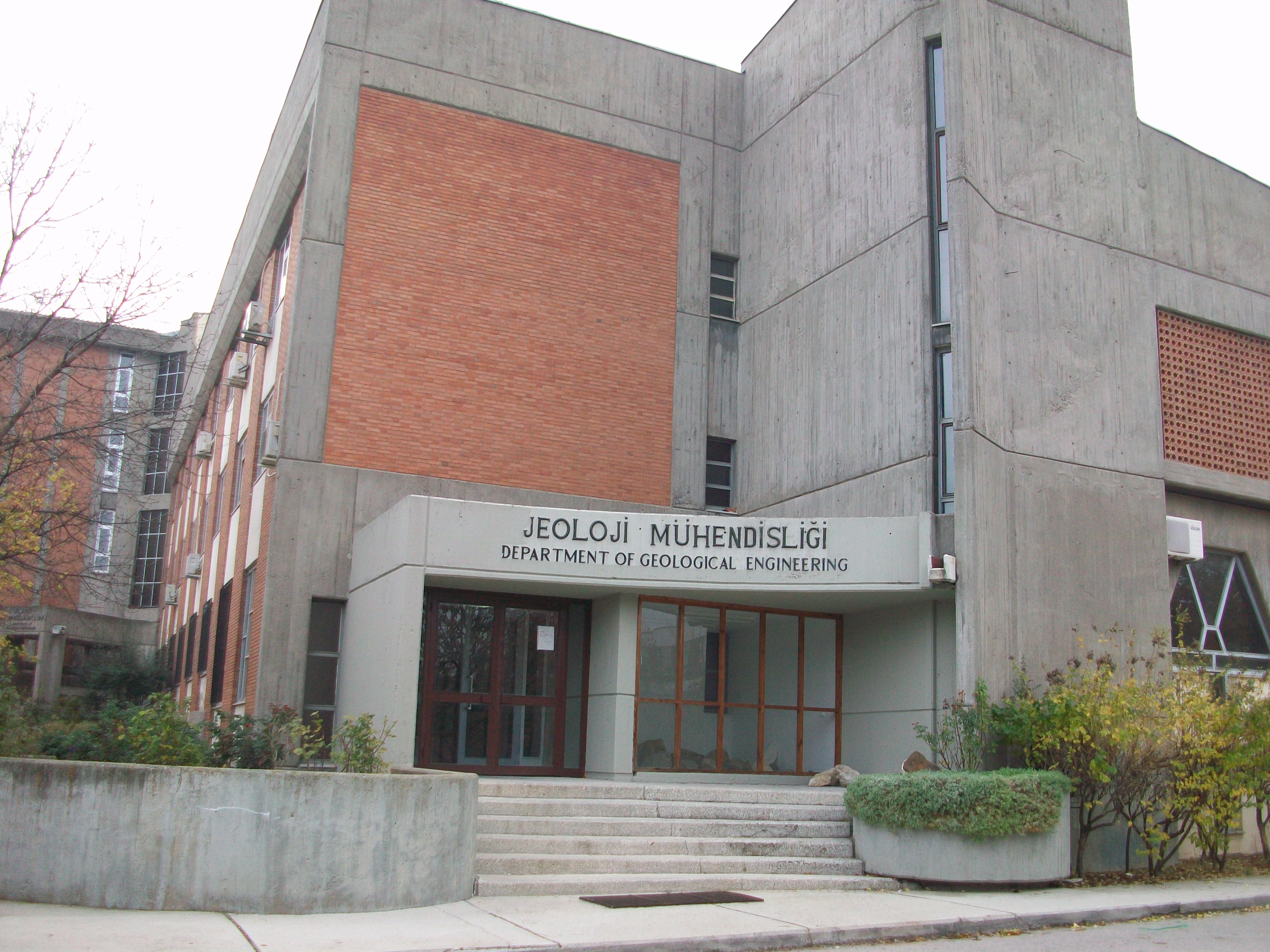 ODTÜ Jeoloji Mühendisliği Bölümü.